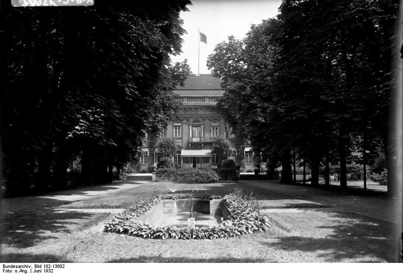 Wo lebt und schafft der deutsche Reichspräsident. Blick auf das in einem wunderbaren Park gelegene Reichspräsidenten-Palais in Berlin.